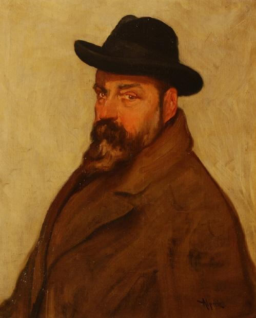 Autorretrato del pintor español Nicolás Alpériz (1865-1928).